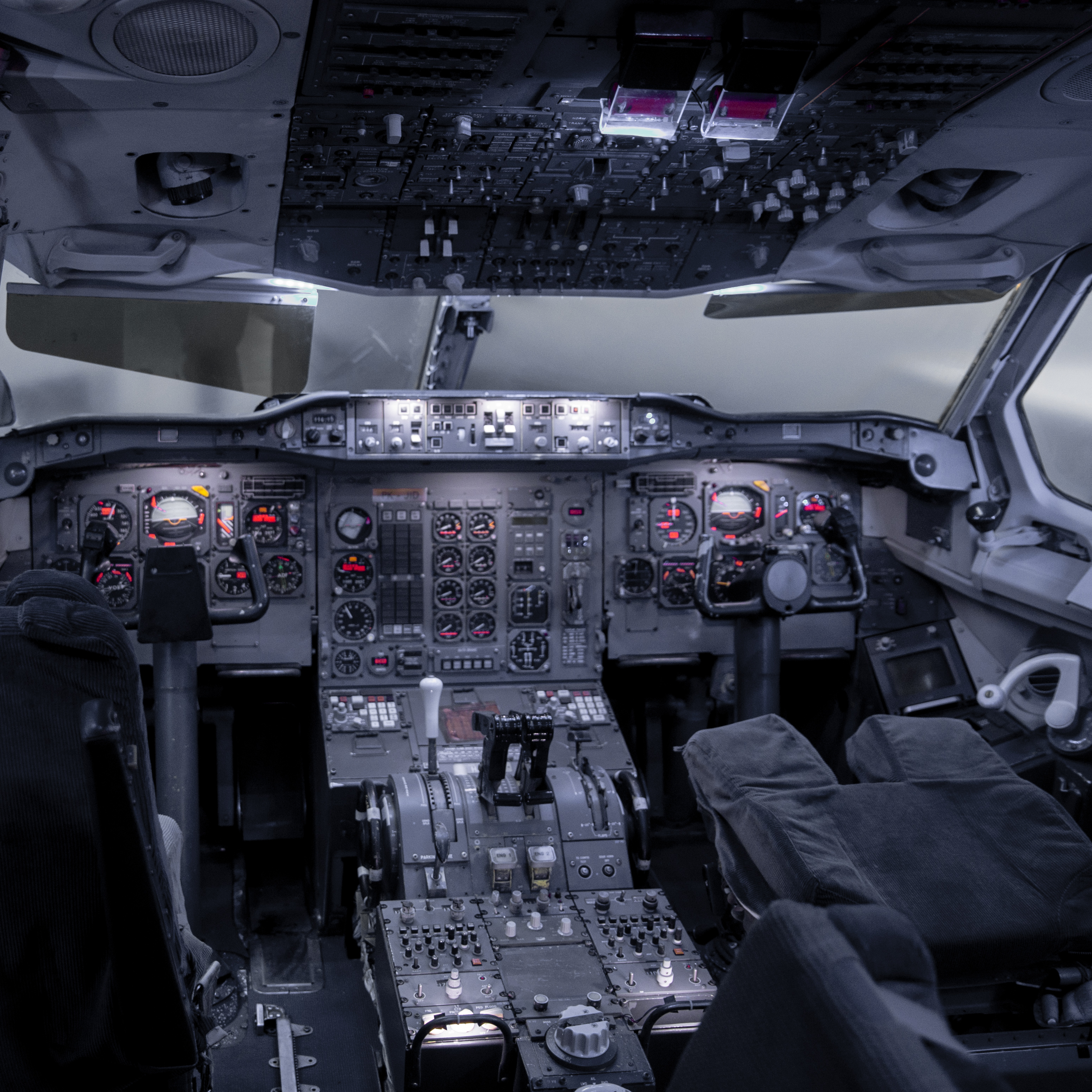 Airbus 300B Flight Deck